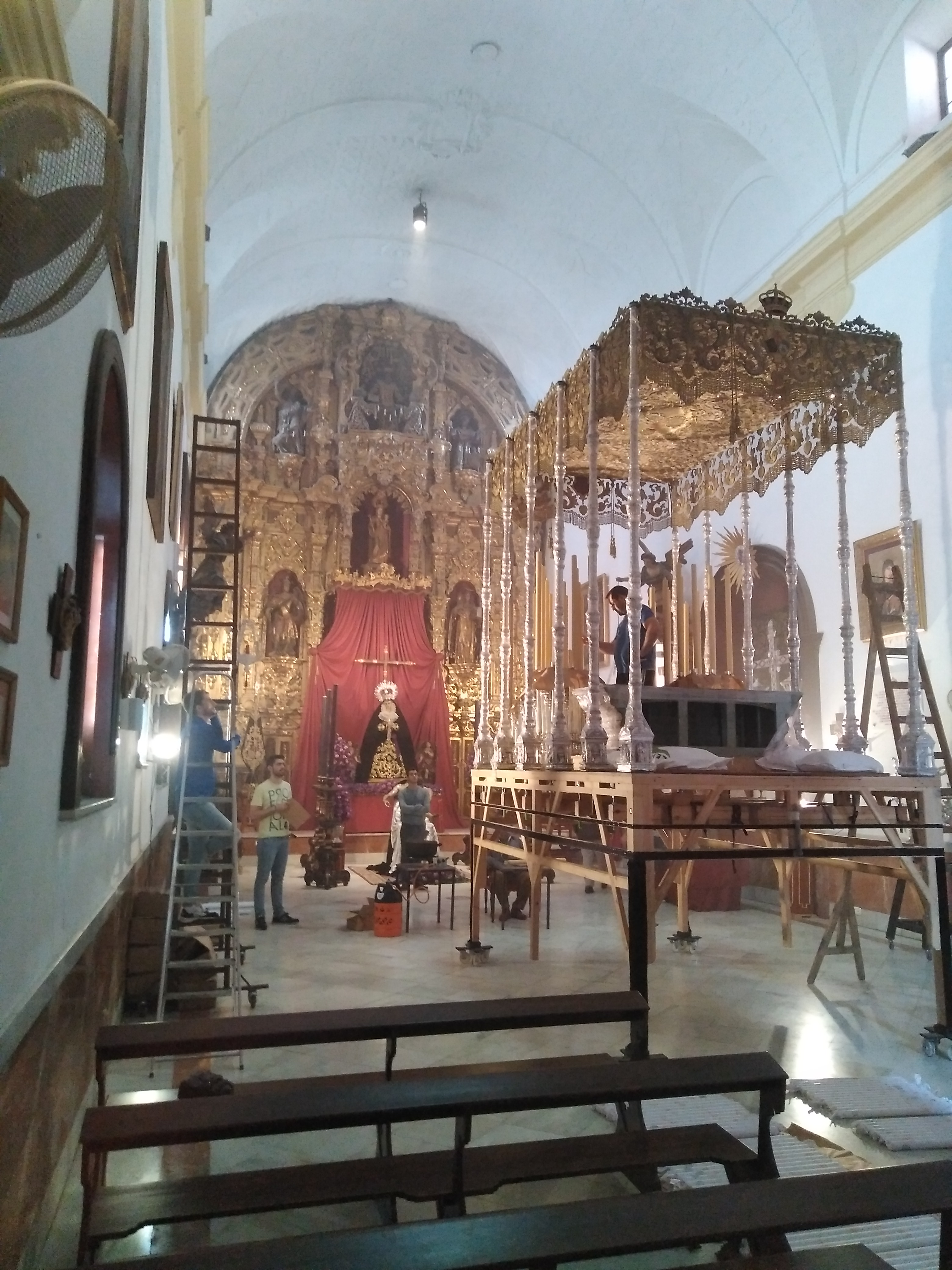 retablo y arreglo palio Victoria Jerez